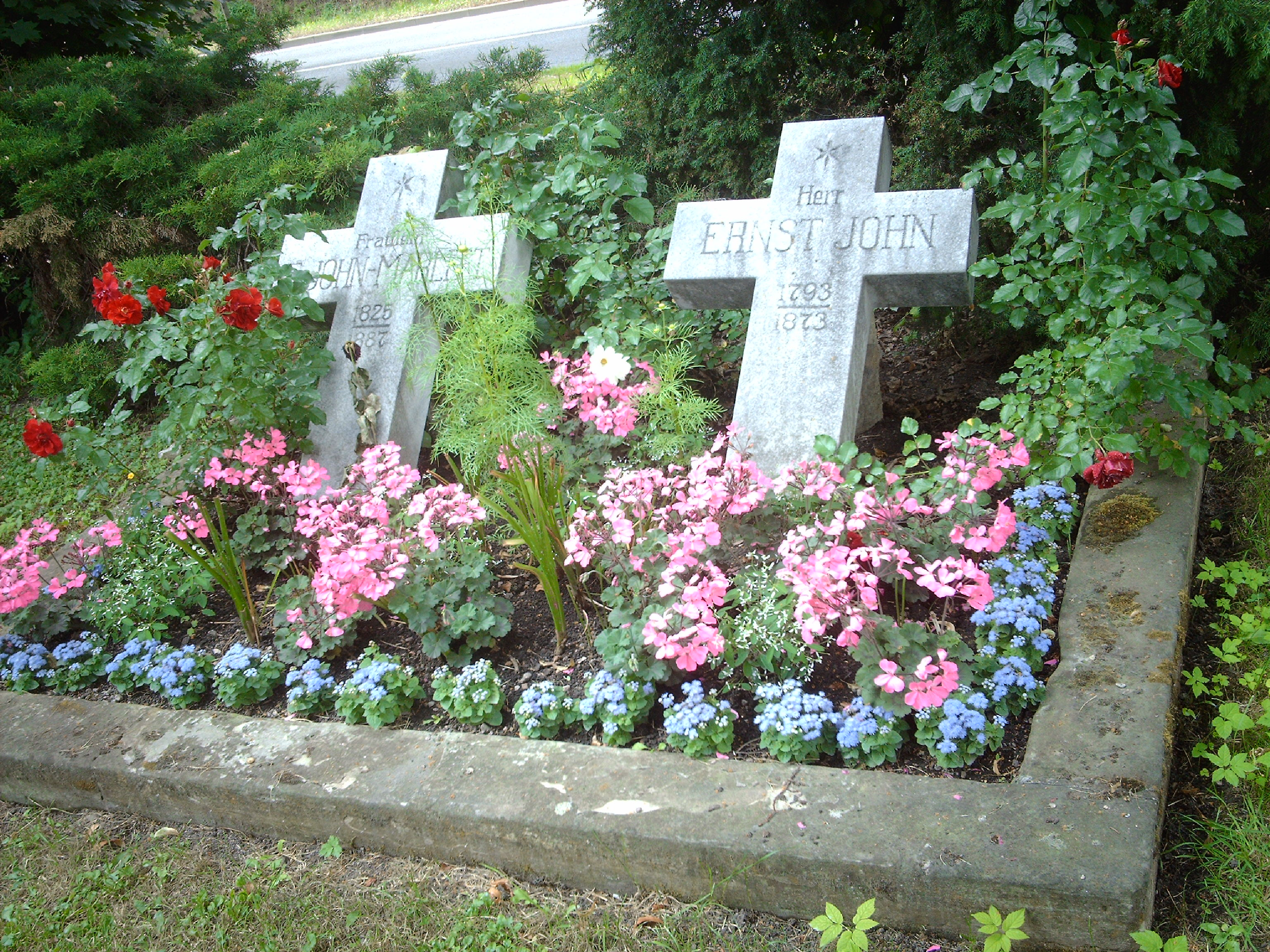 Grabmal von E. Marlitt auf dem Alten Friedhof in Arnstadt